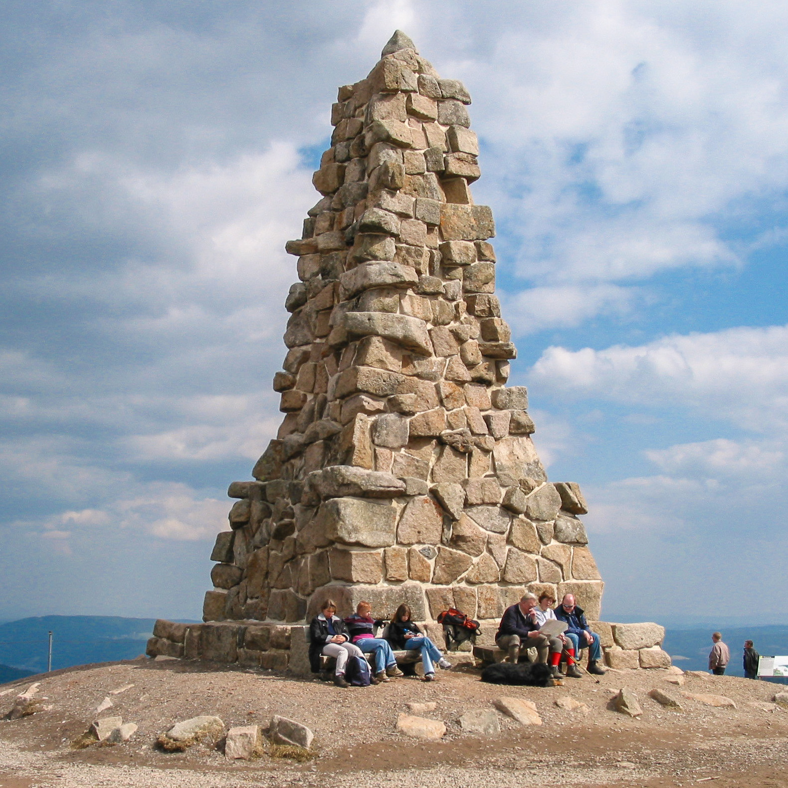 Bismarckdenkmal, Seebuck/Feldberg, Schwarzwald